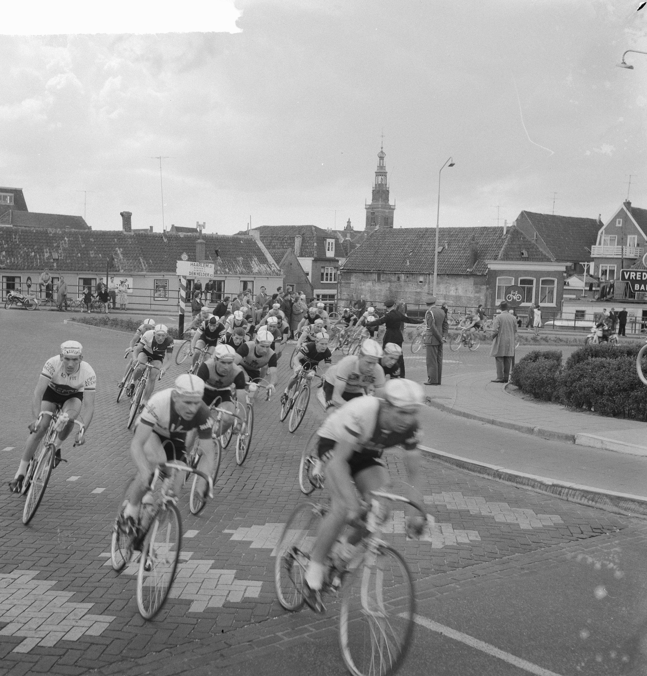 Collectie / Archief : Fotocollectie Anefo Reportage / Serie : [ onbekend ] Beschrijving : Ronde van Nederland in Alkmaar. Peloton trekt door Alkmaar Datum : 17 mei 1961 Locatie : Alkmaar, Nederland Trefwoorden : ronden, wielrennen Fotograaf : Koch, Eric / Anefo Auteursrechthebbende : Nationaal Archief Materiaalsoort : Negatief (zwart/wit) Nummer archiefinventaris : bekijk toegang 2.24.01.03 Bestanddeelnummer : 912-4894